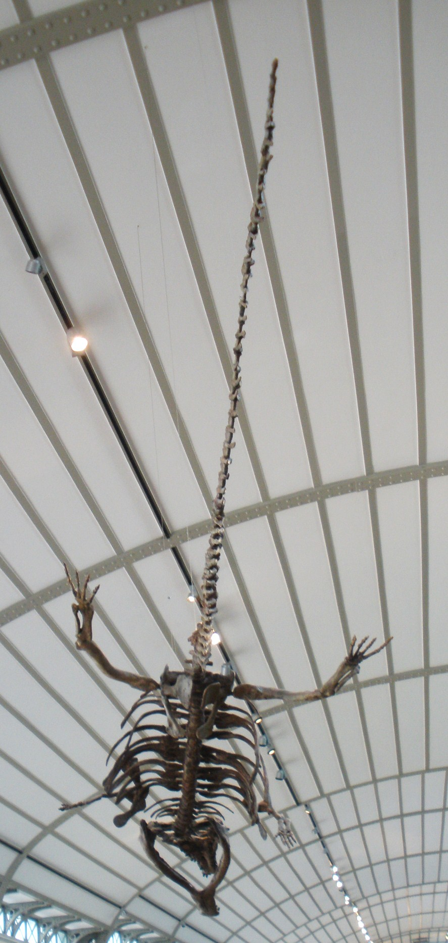 Fossil of Machimosaurus, an extinct crocodile Took the photo at Musee d'Histoire Naturelle, Brussels